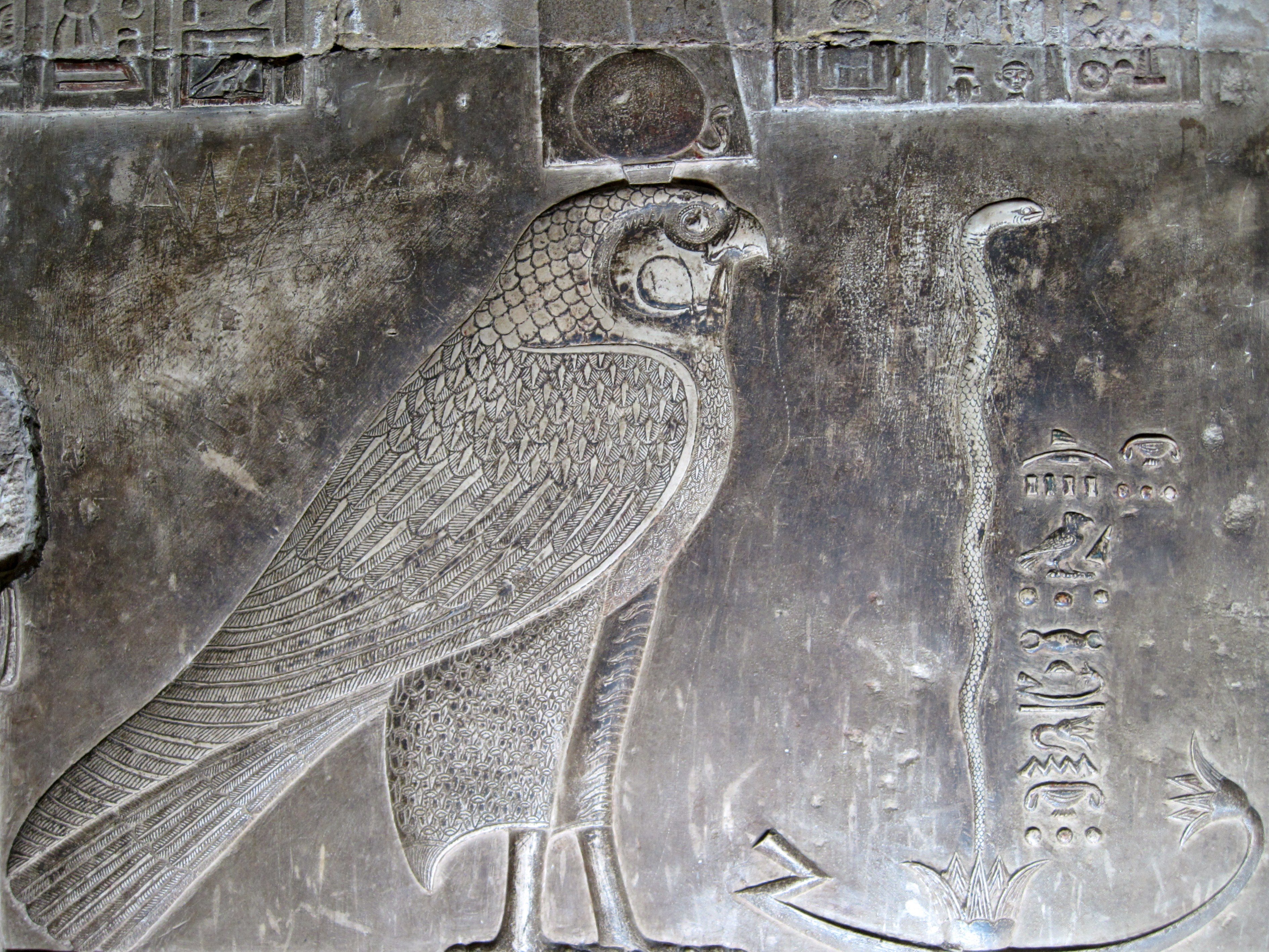 Relief in der Krypta des Tempels von Dendera, Ägypten